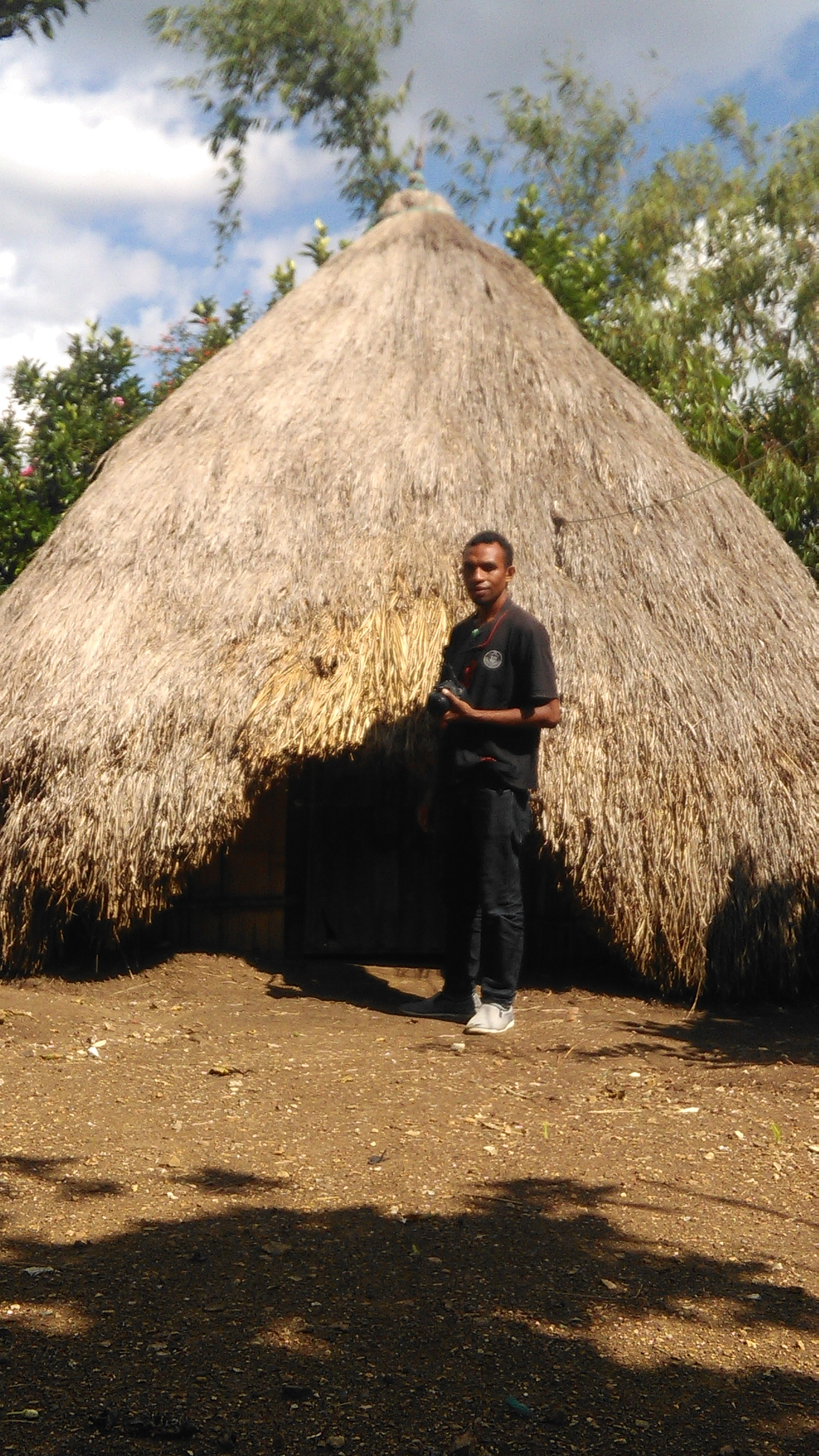 Rumah bulat, rumah adat masyarakat Suku Timor, di Kabupaten Timor Tengah Selatan-Nusa Tenggara Timur.